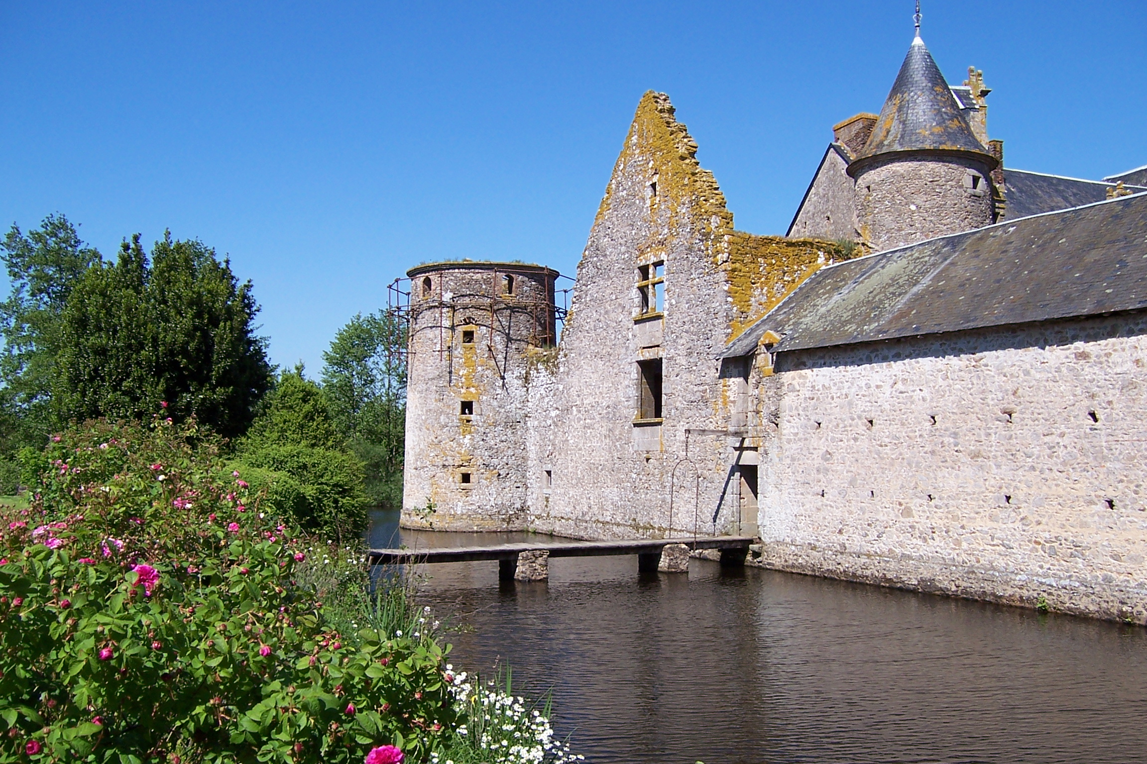 France - Deux-Sèvres - Beaulieu sous Parthenay - Le château de la Guyonnière